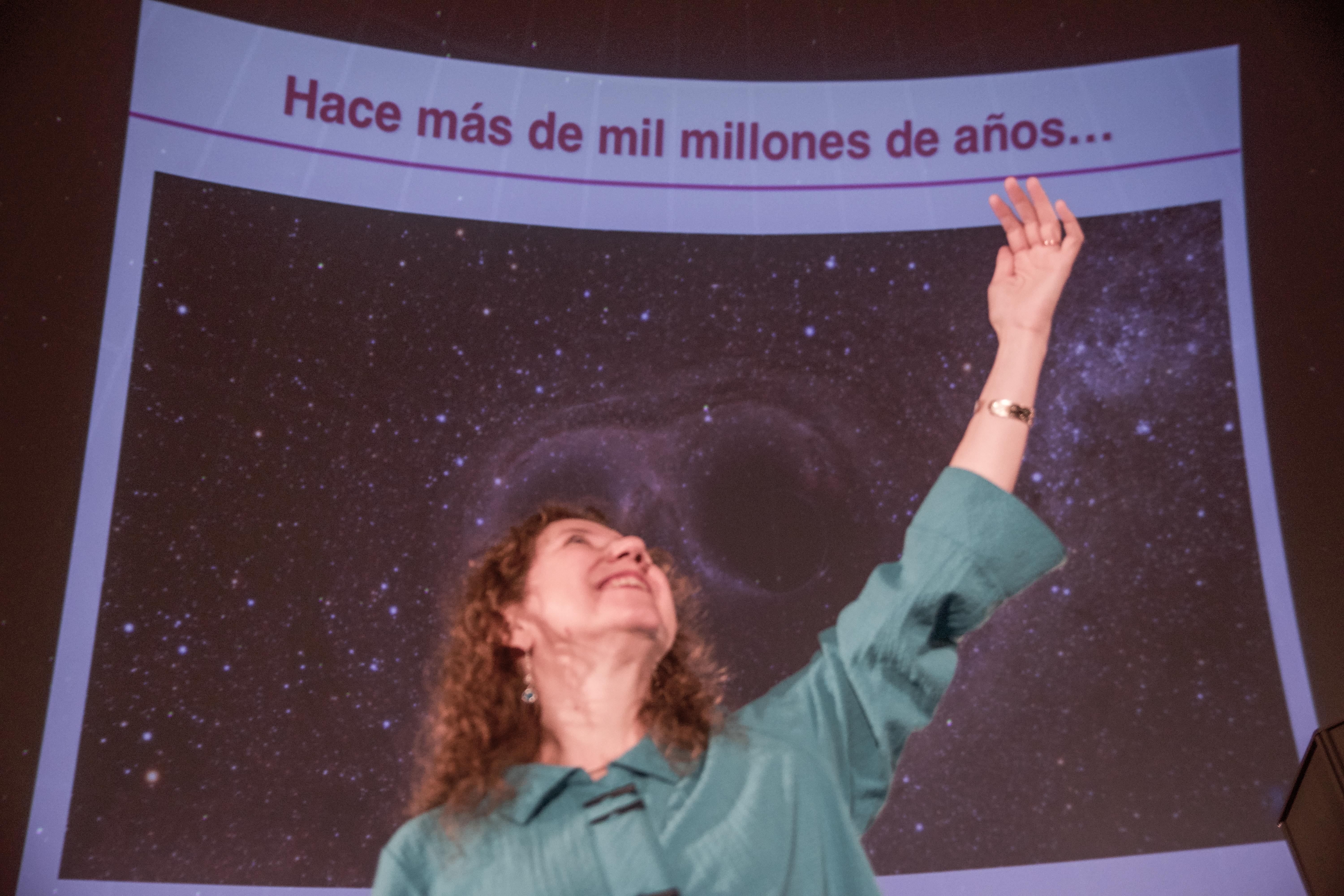 Buenos Aires, miércoles 25 de julio de 2018._ El Planetario Galileo Galilei fue escenario de la conferencia “La música del universo - Einstein, agujeros negros y ondas gravitacionales”, impartida por Gabriela González. Foto: Kaloian/ Ministerio de Cultura de La Nación